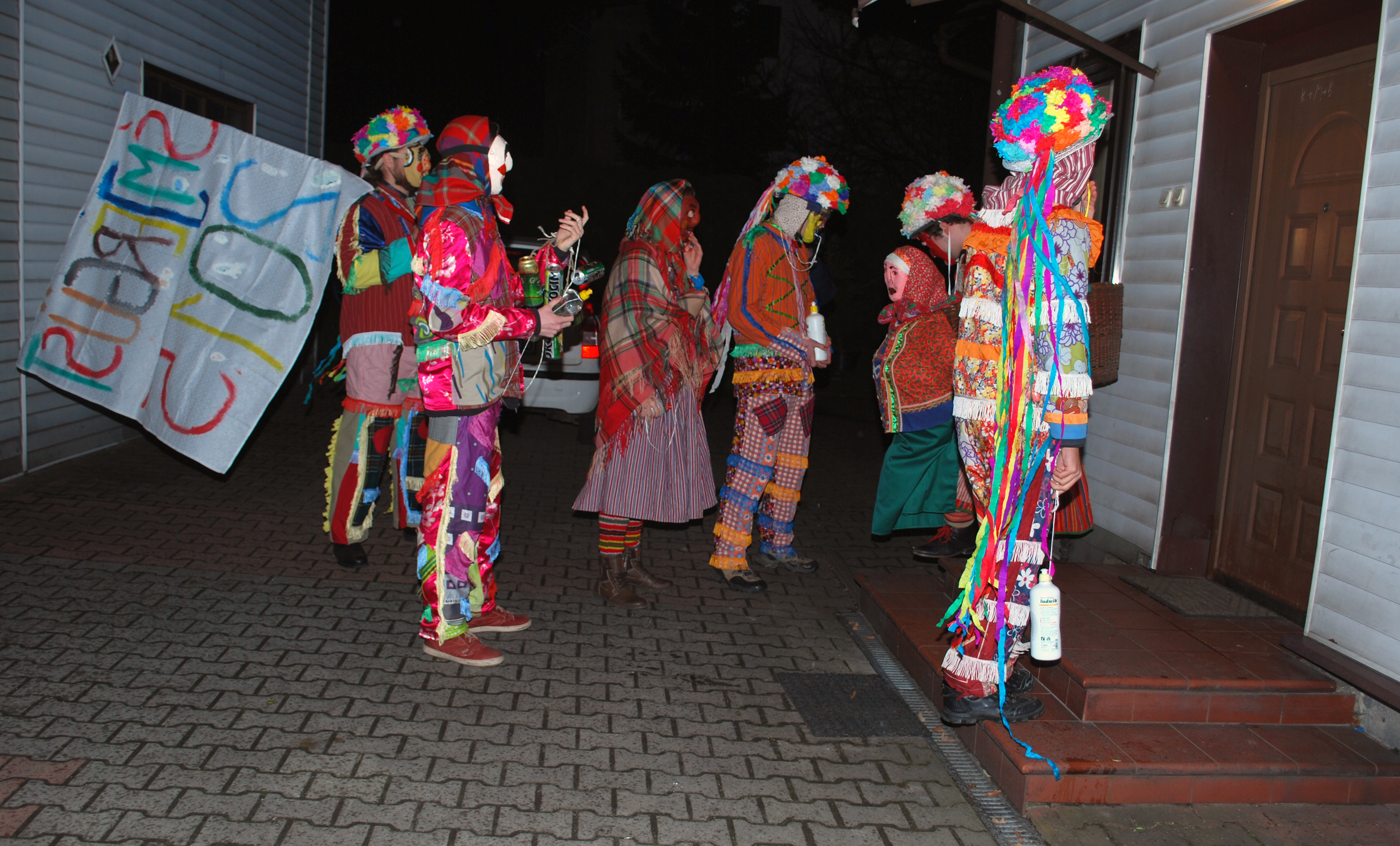 Śmierguśnicy - pukanie do domu panny nocą